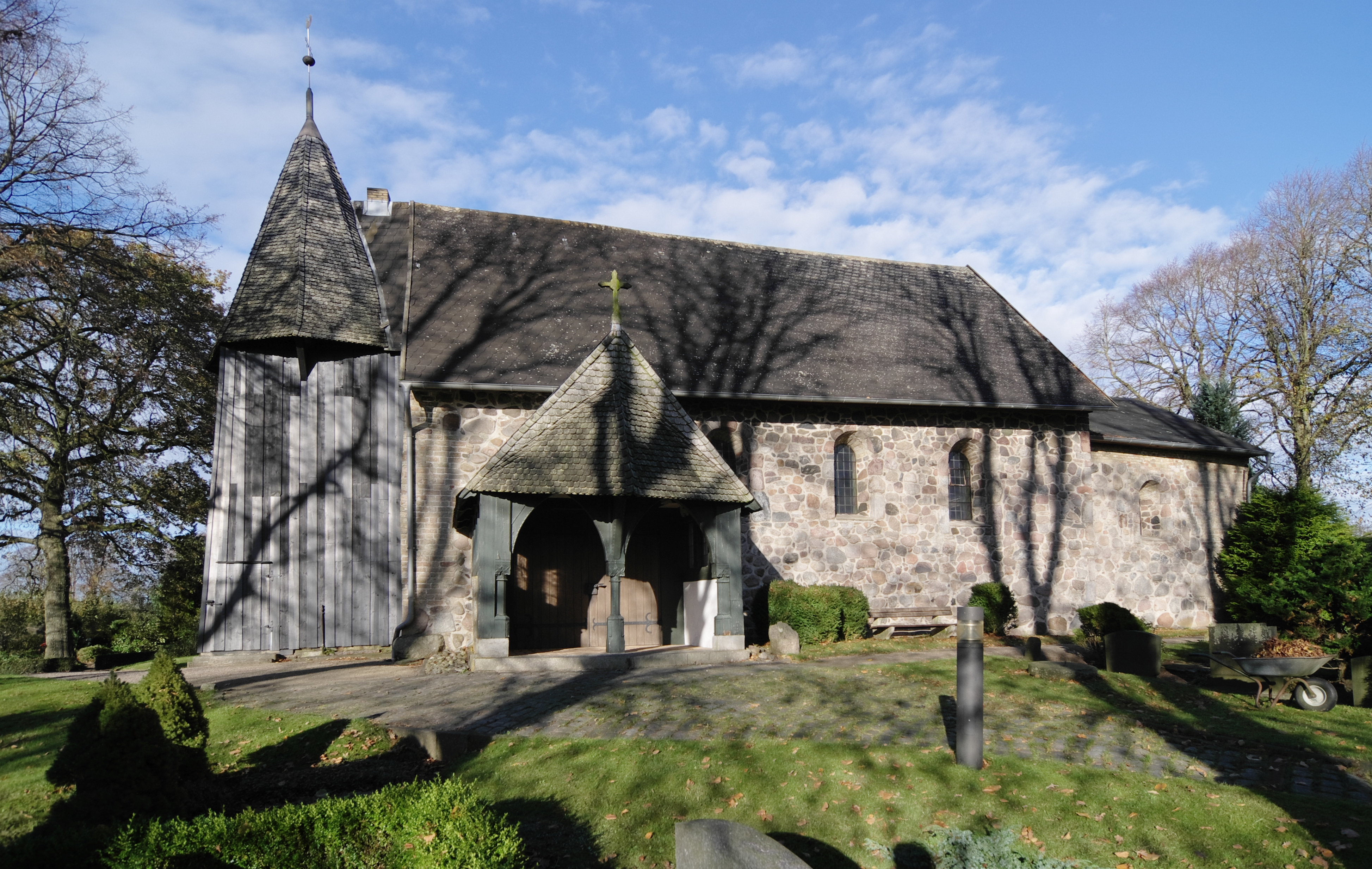 Denkmalgeschützte Kirche St. Jakobus zu Moldenit, Schaalby, Kreis Schleswig-Flensburg.